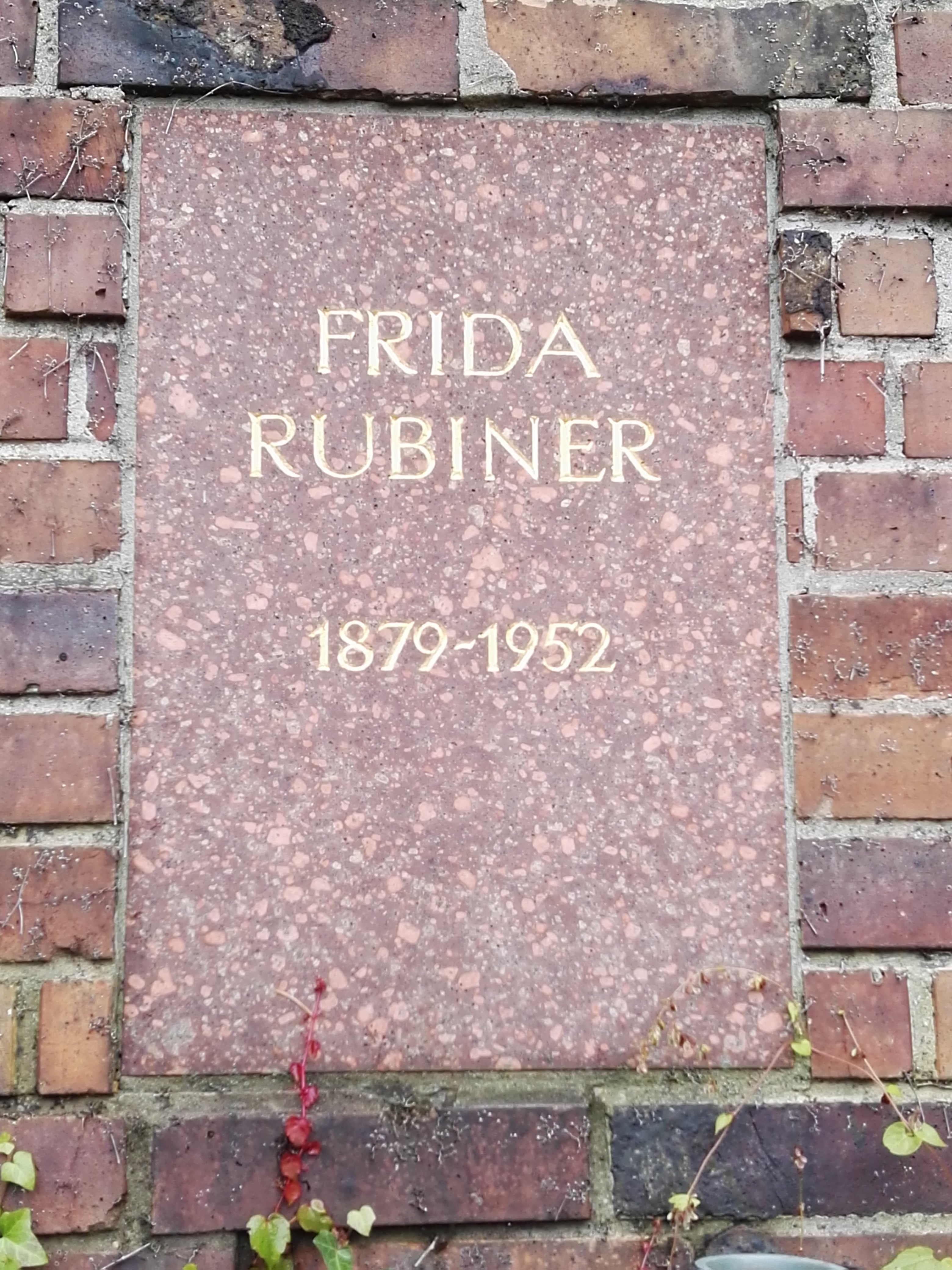 Grab von Frida Rubiner in der Gedenkstätte der Sozialisten auf dem Zentralfriedhof Friedrichsfelde in Berlin-Lichtenberg